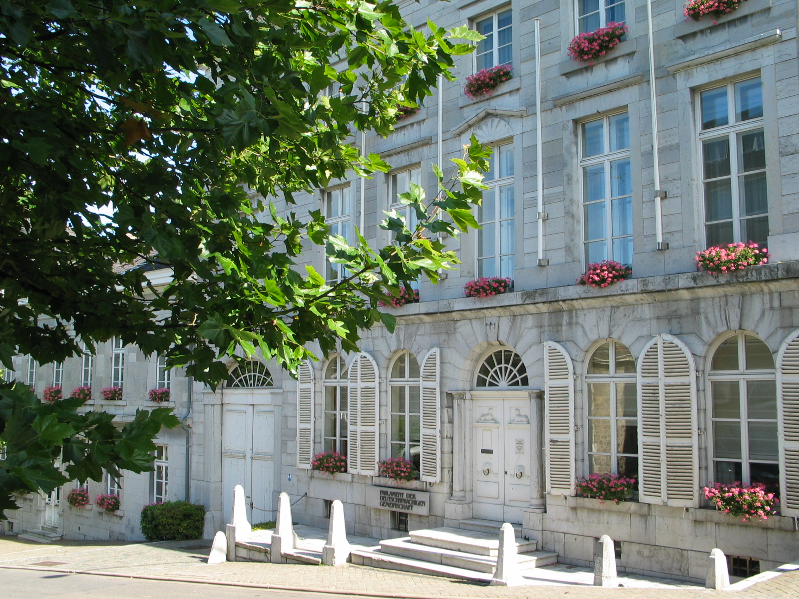 Ehemalige Parlamentsgebäude der Deutschsprachigen Gemeinschaft Belgiens in Eupen, Kaperberg 8. 1812 als Wohnhaus der Eupener Tuchmacherfamilie Sternickel erbaut.